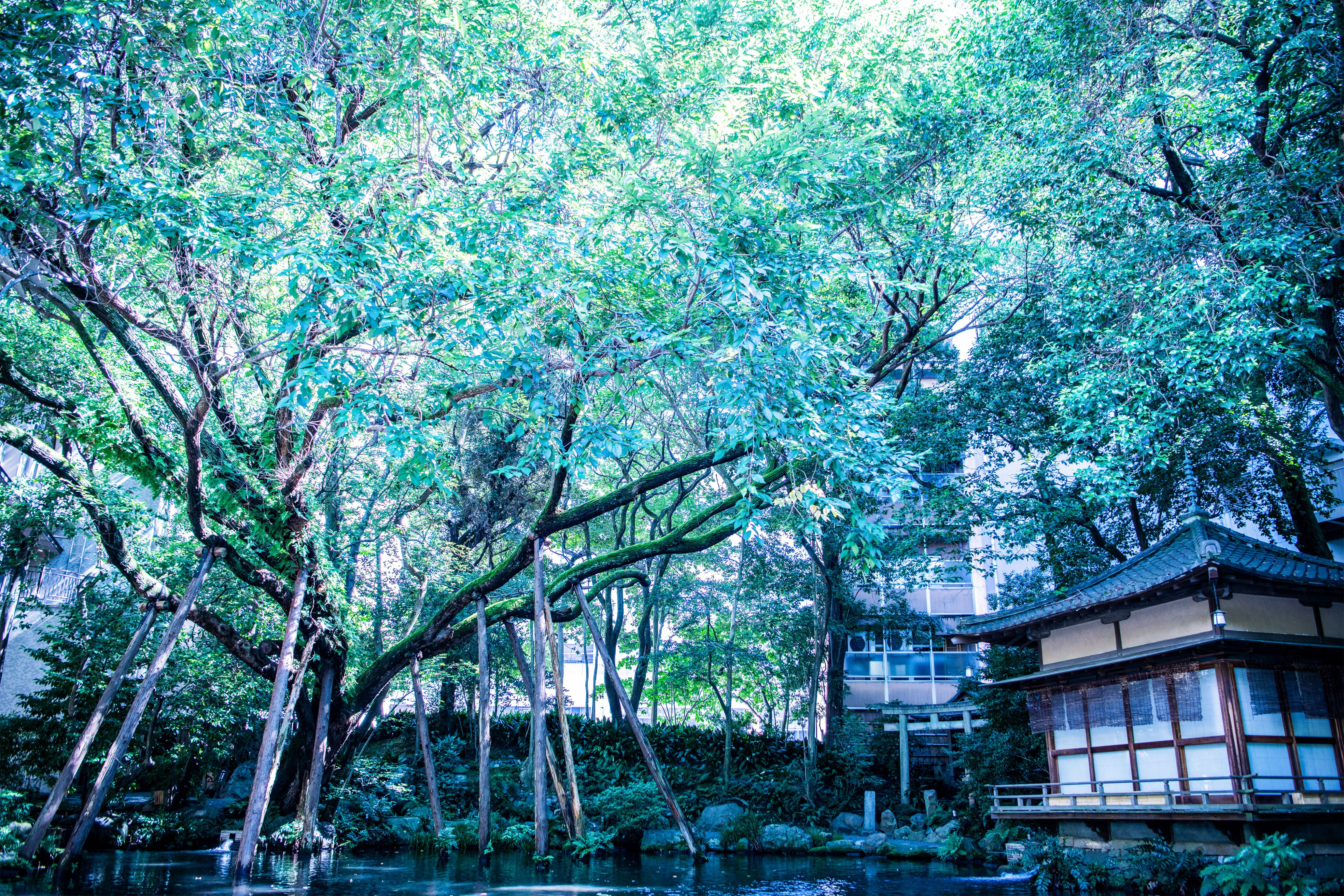 水上ステージからの春楡の木・子福稲荷神社・茶室の眺め